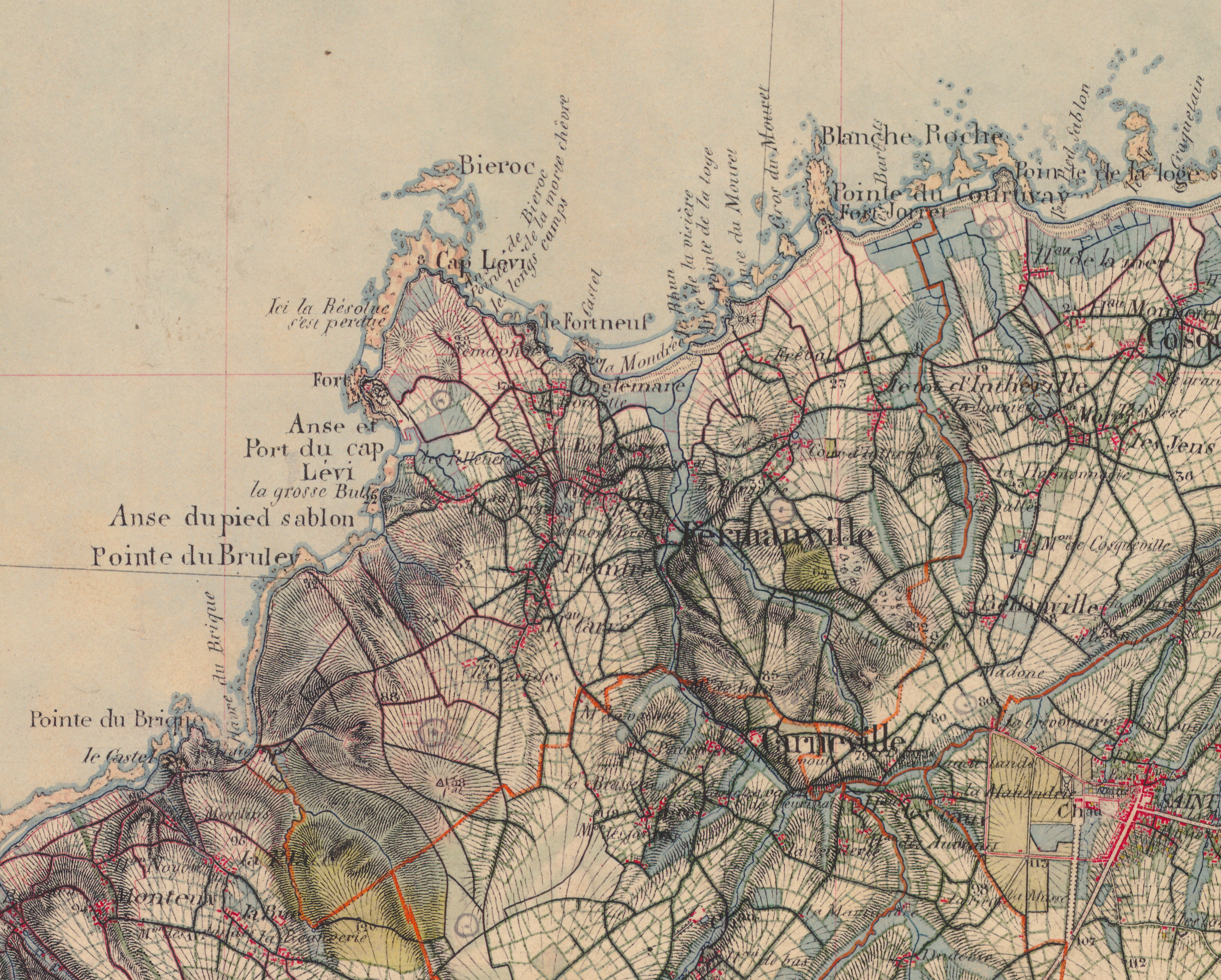 Carte de Fermanville, issue de la carte d'état-major de 1866.